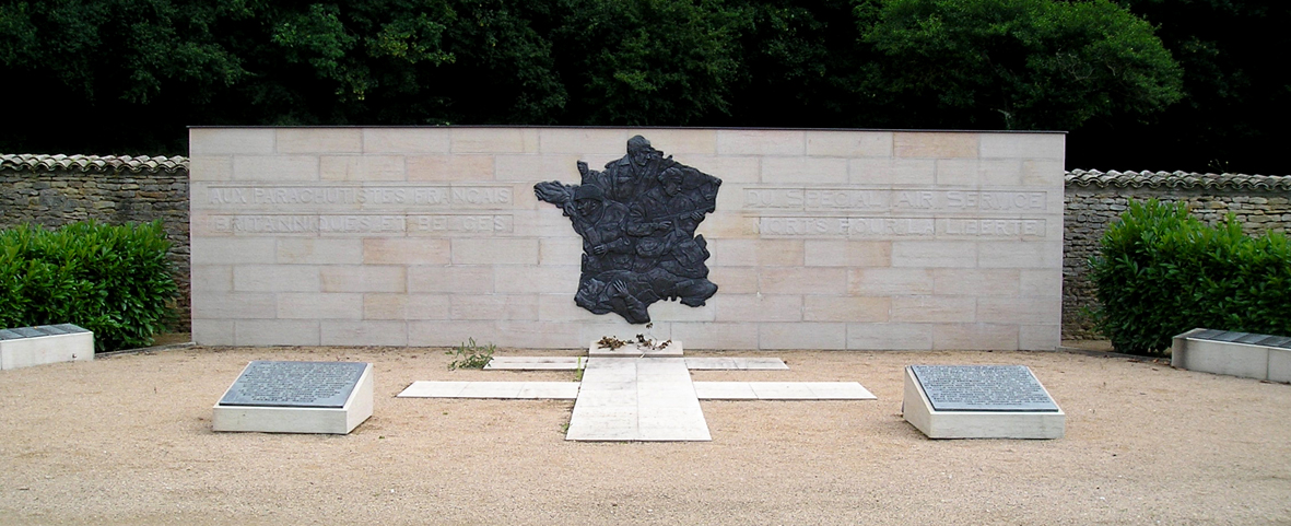 Le mémorial des parachutistes français, britanniques et belges du Special Air Service de Sennecey-le-Grand.